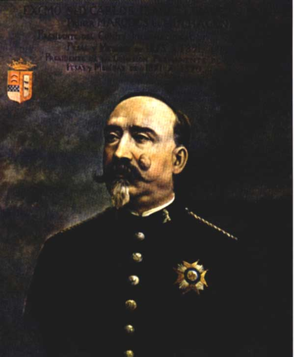 Retrato del General Carlos Ibáñez e Ibáñez de Ibero, fundador de la Asociación Geodésica Internacional. Debió ser pintado en 1881 o antes, ya que un grabado basado en este cuadro fue publicado en la revista La Ilustración Militar en 1881